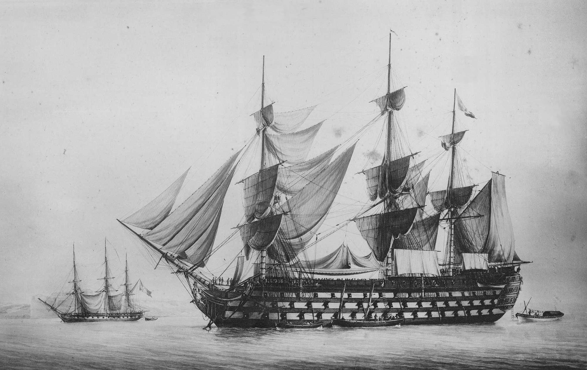 Wagram